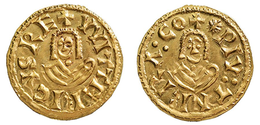 Imitación moderna (¿siglo XX?) de un tremis visigodo de oro acuñado en Tarragona ("Tarraco") durante el reinado de Witerico. Leyendas: anverso "+VVITTIRICVSRE", reverso "+*PIV:TARRA:CO". Fuente: Ruth Pliego, La Moneda Visigoda, 2009, 972. Conservación: EBC+.